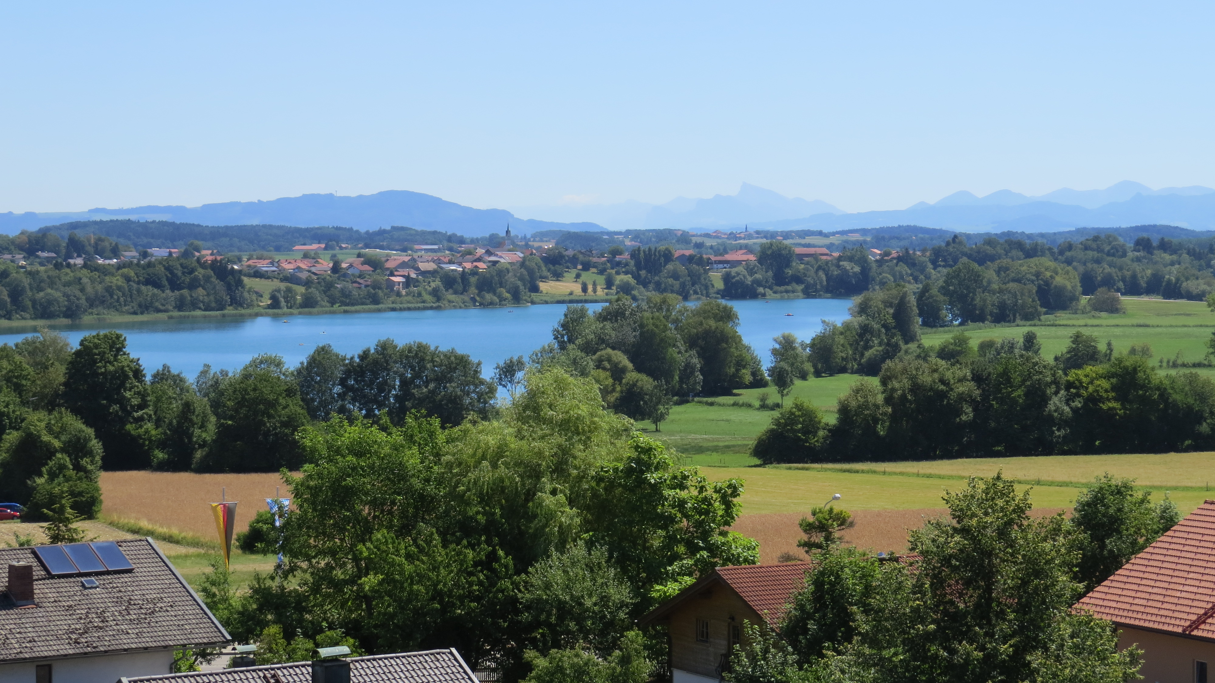 Tachinger See